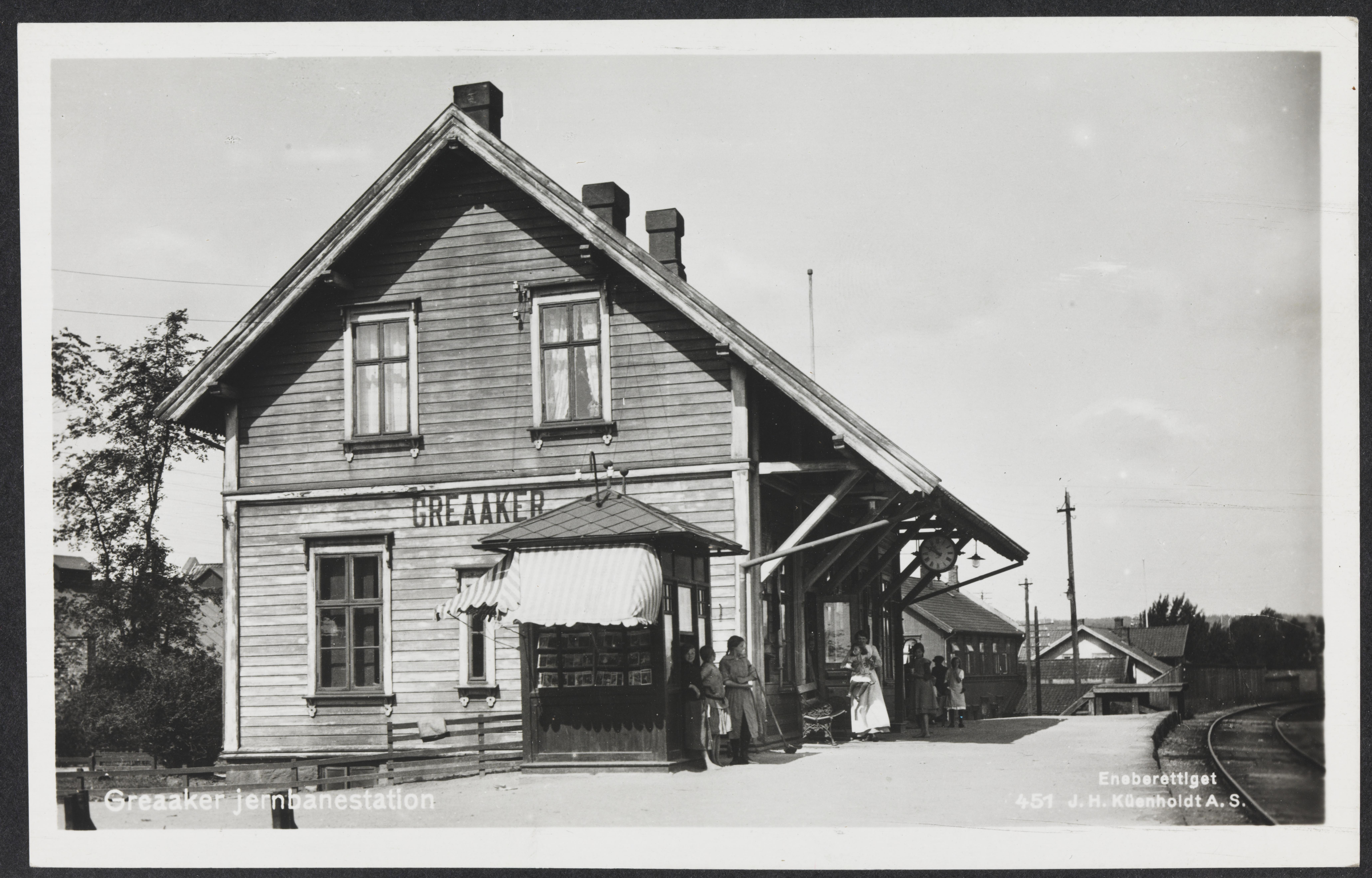 Bildet er hentet fra Nasjonalbibliotekets bildesamling Greåker, Sarpsborg, Østfold